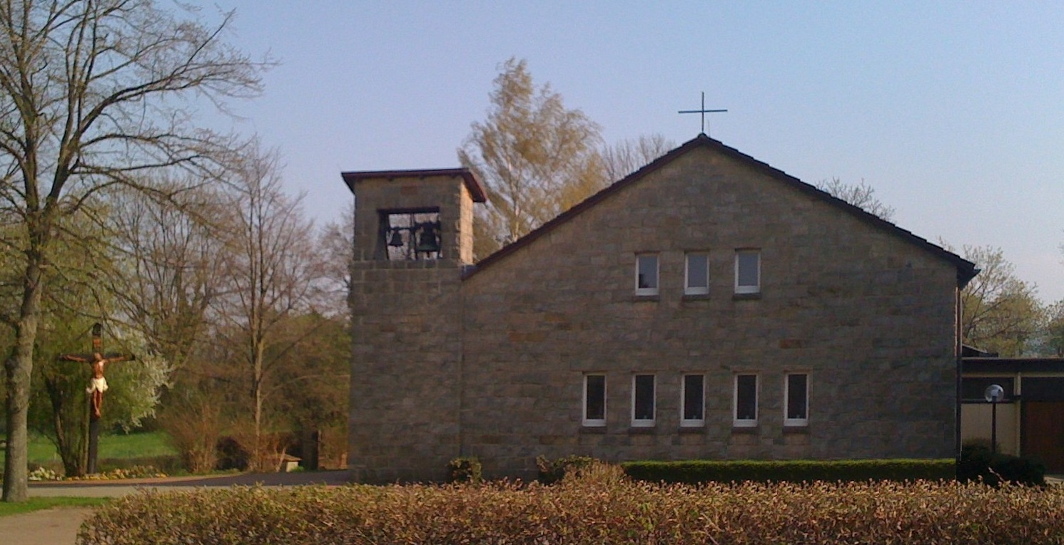 Langelsheim, kath. Kirche Herz Mariä